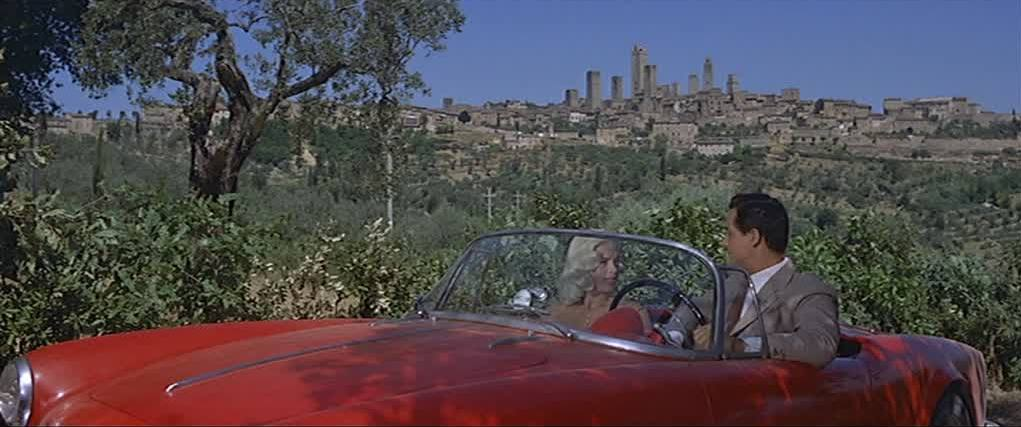 Diana Dors e Vittorio Gassman in una scena di La ragazza del palio (1958) di Luigi Zampa